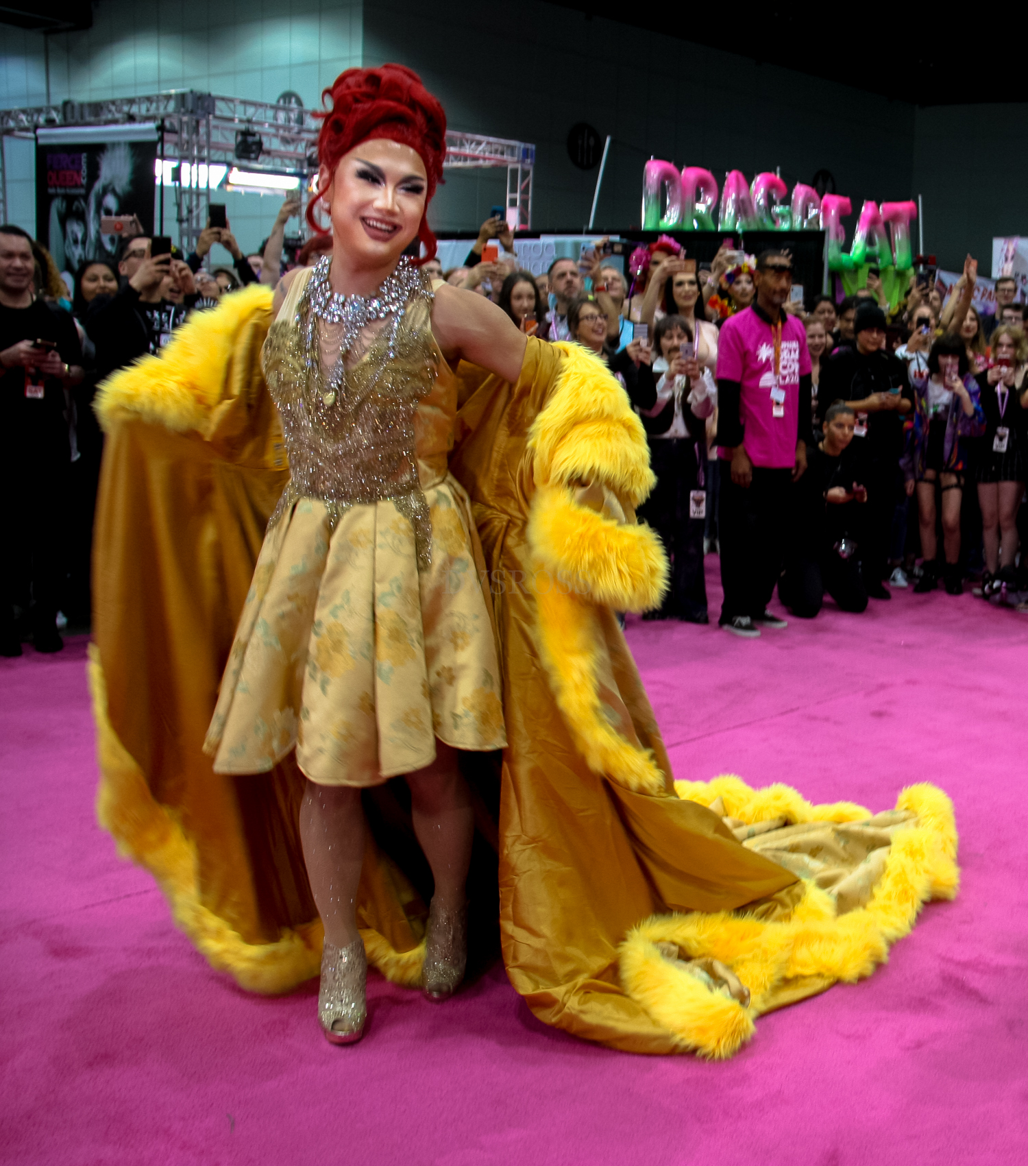 Rupaul DragCon 2019 - Los Angeles